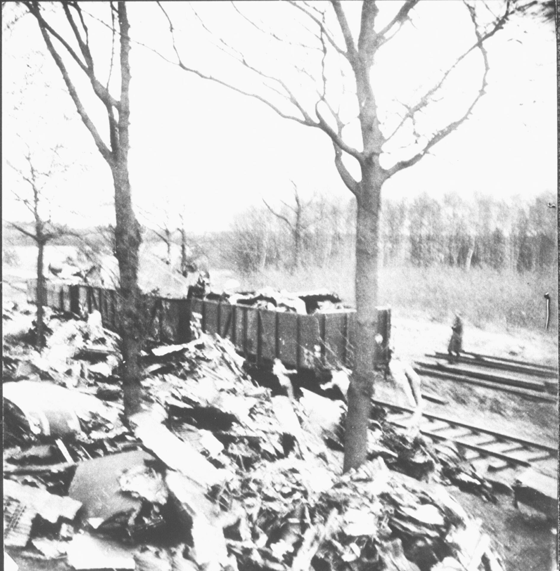 Spoorlijn in het Kamp Vught najaar 1944